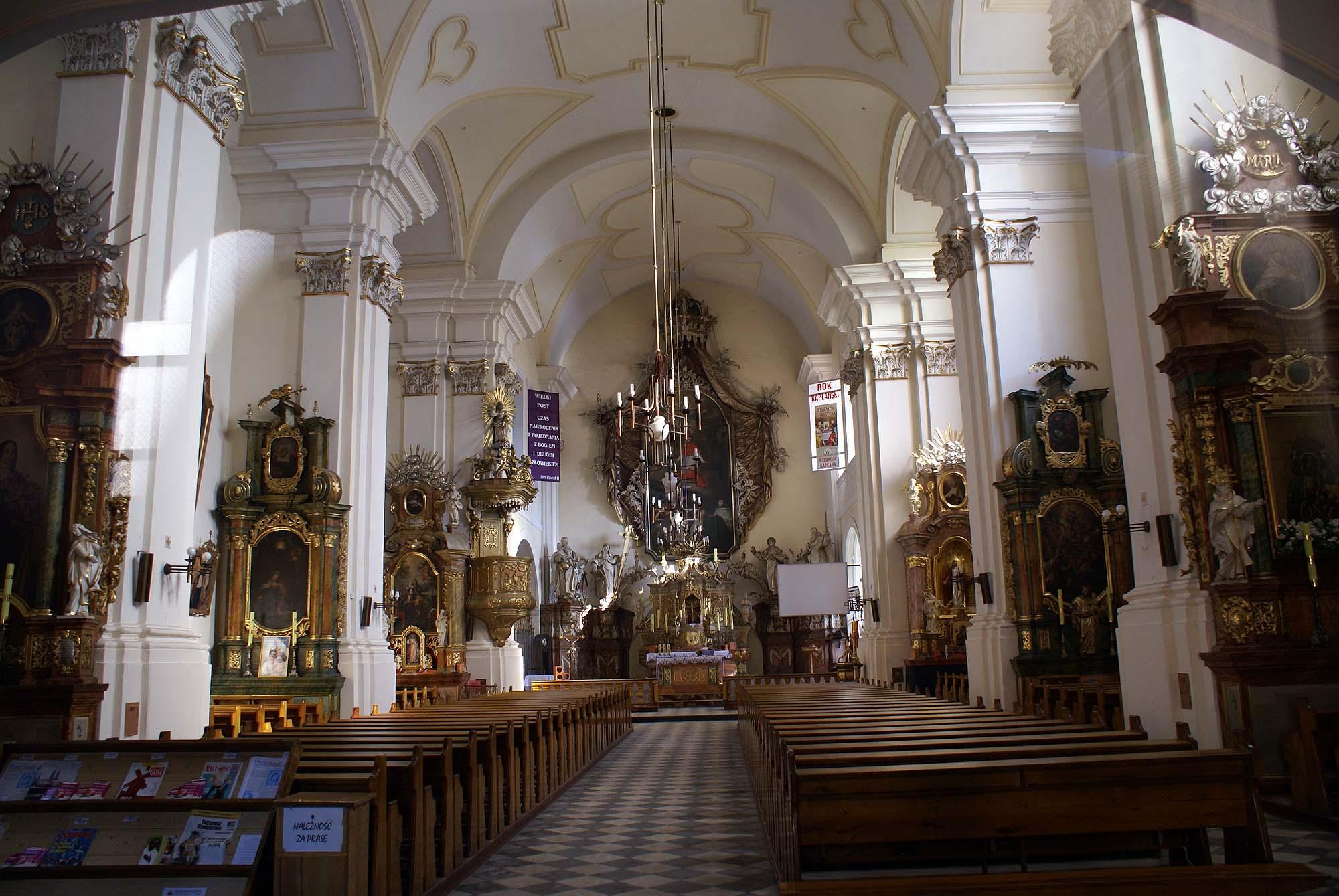 Wołów - barokowy kosciół parafialny pw. św. Karola Boromeusza, 1712-1726, 1781